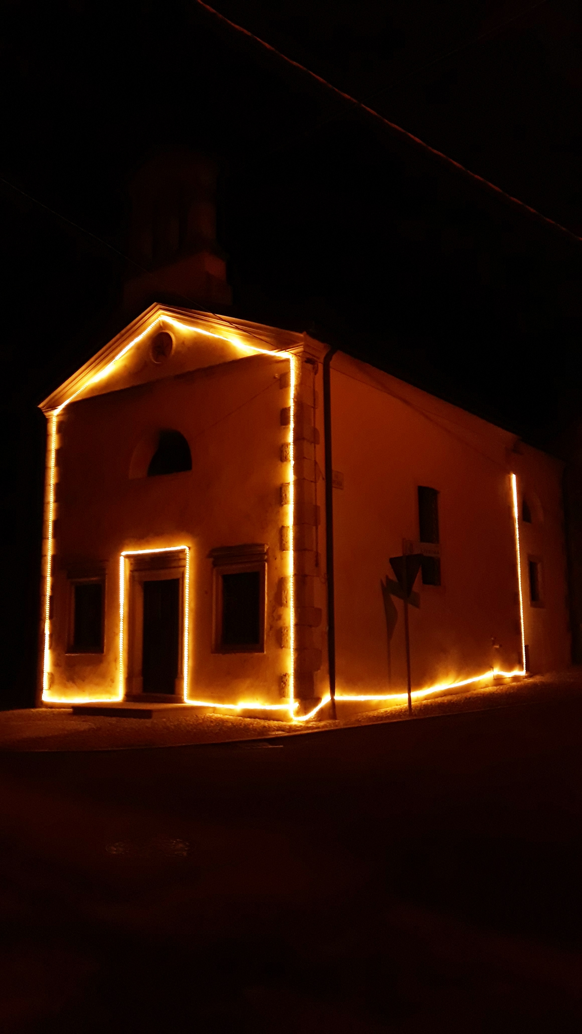 Chiesa decorata con illuminazione a led